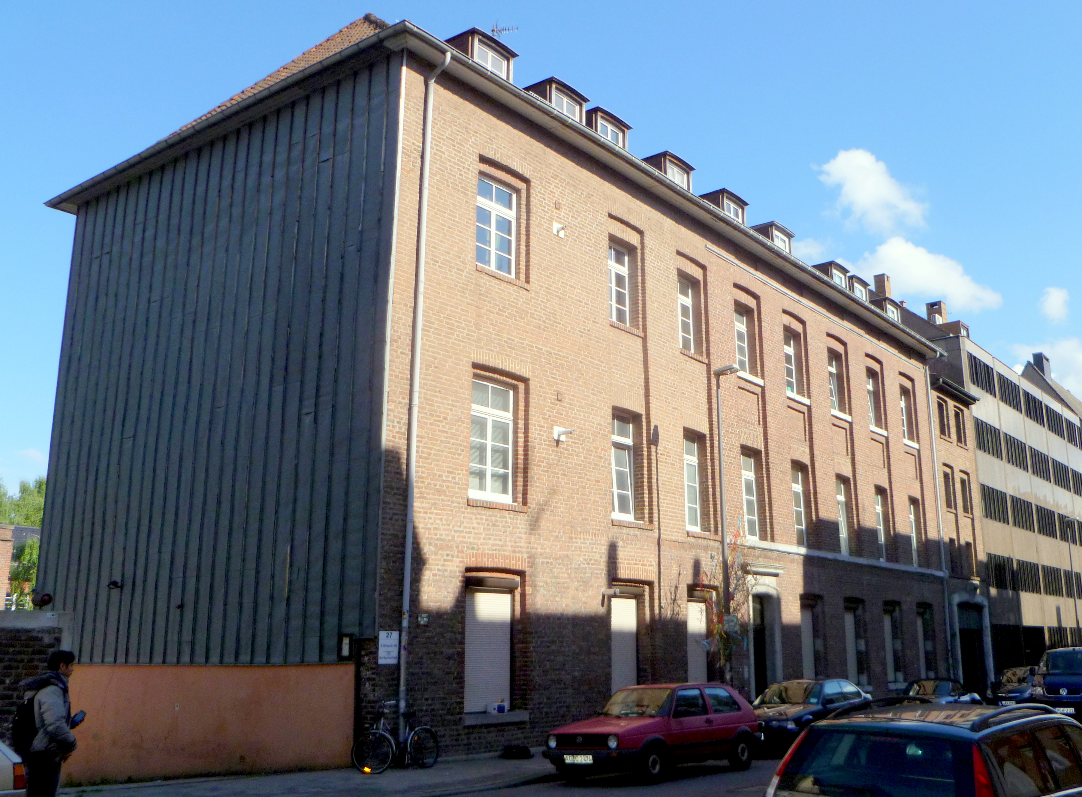 Baudenkmal in Aachen-Mitte